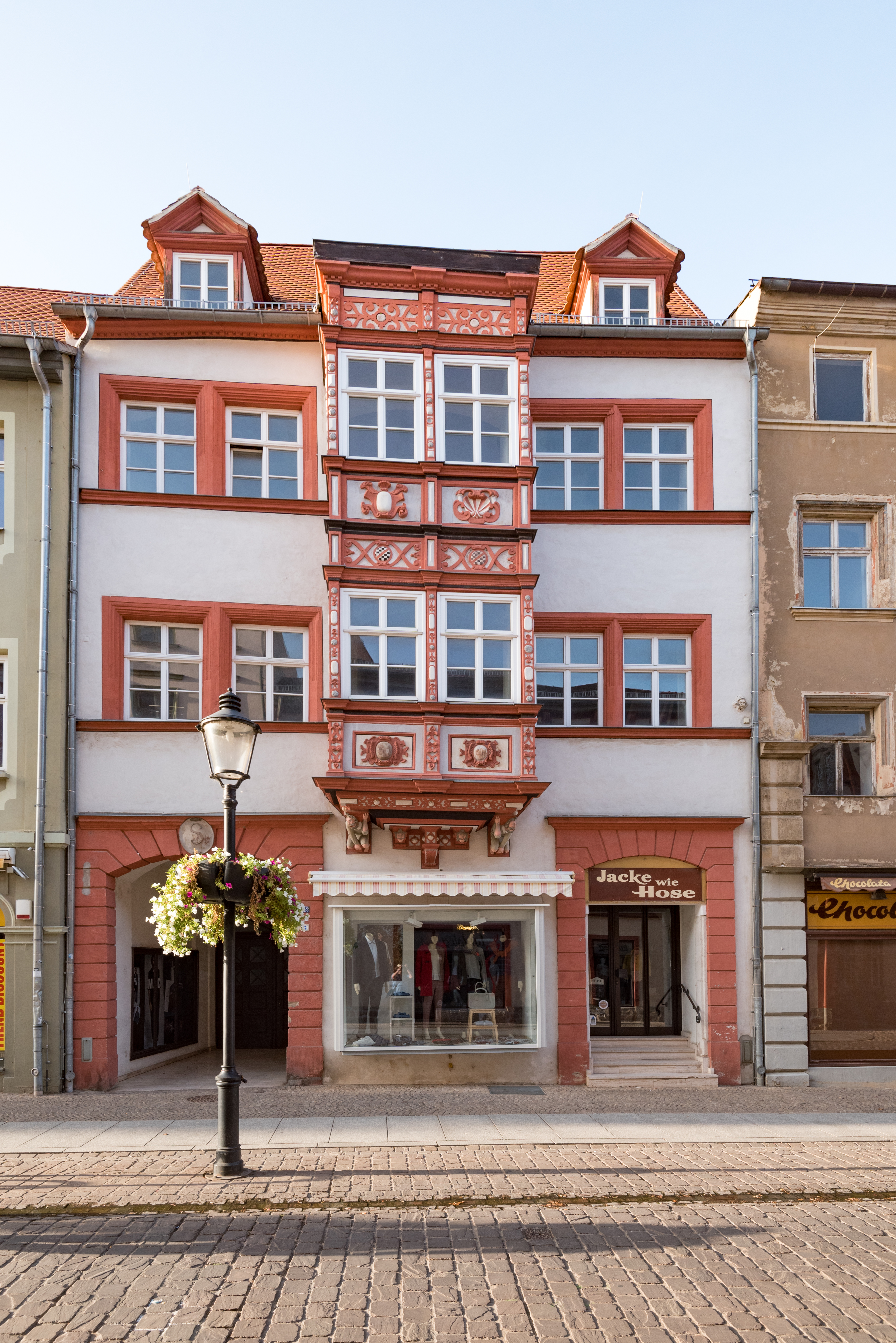 Naumburg (Saale), Jakobstraße 32